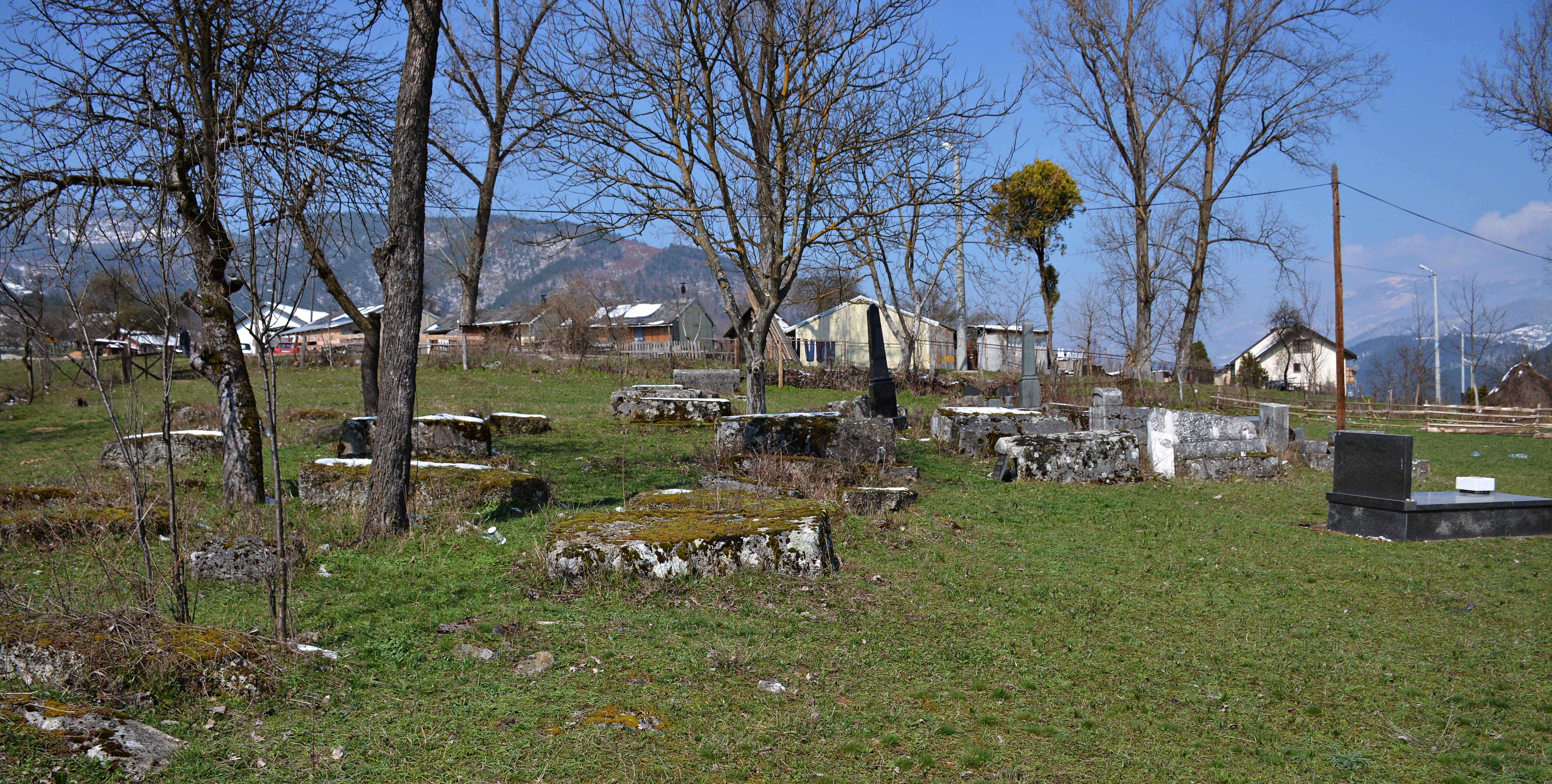 Na najlepsem mestu u Visegradu, sa pogledom na stari most, ali, cisto i pokoseno...ceka neke bolje dane da se uredi i sanira